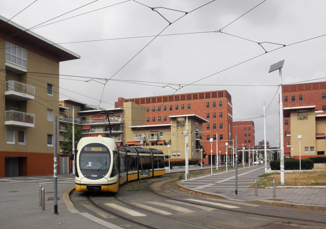 Vettura tranviaria 7502 dell'ATM di Milano in piazzale Egeo